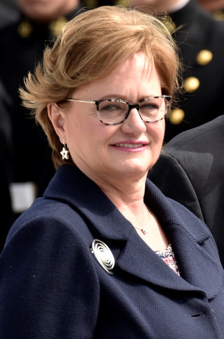 Mandatarios de Perú y China colocan ofrenda floral ante monumento a Próceres y Precursores de la Independencia